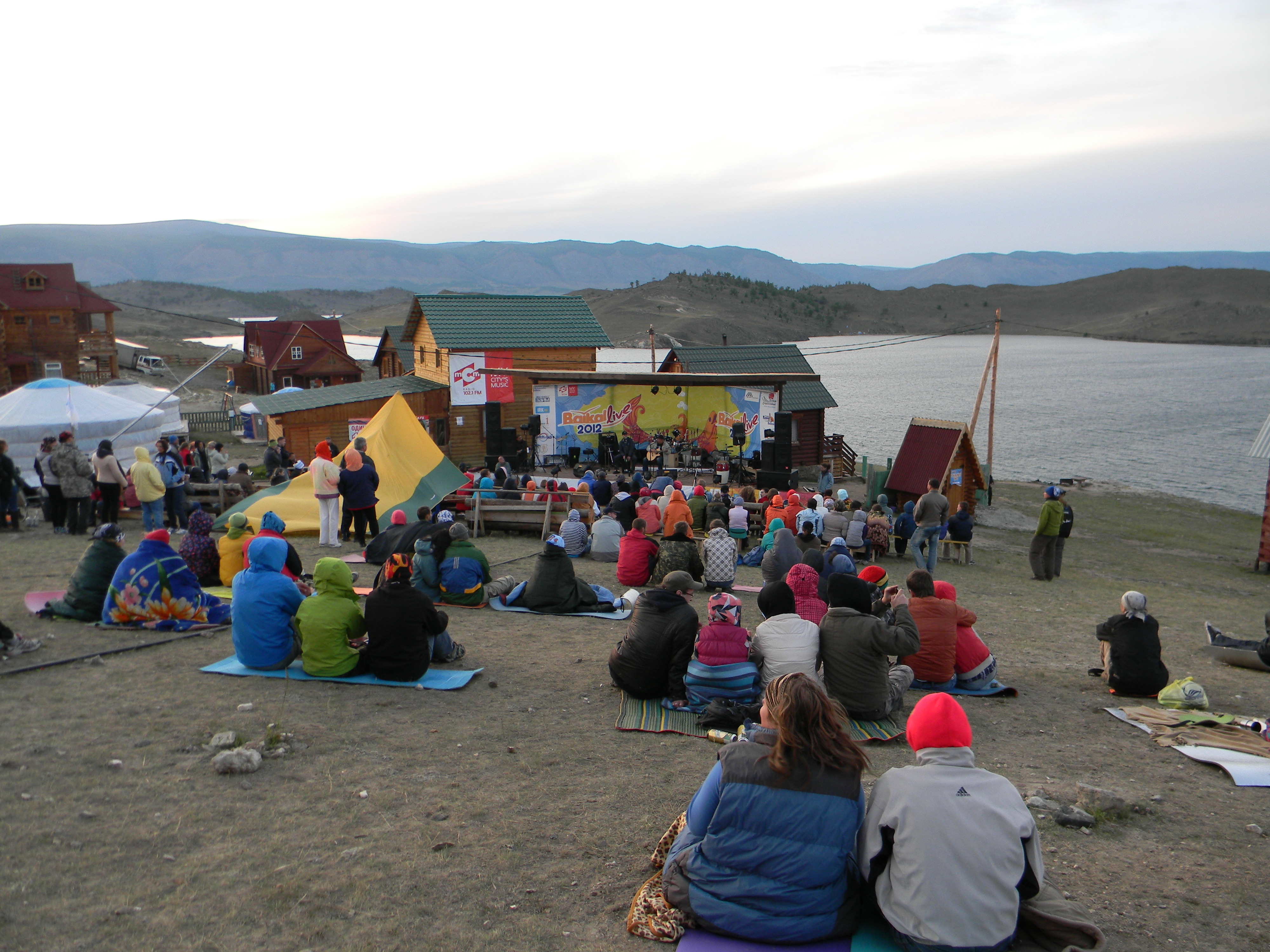 Вид на основную площадку летнего фестиваля Baikal-live